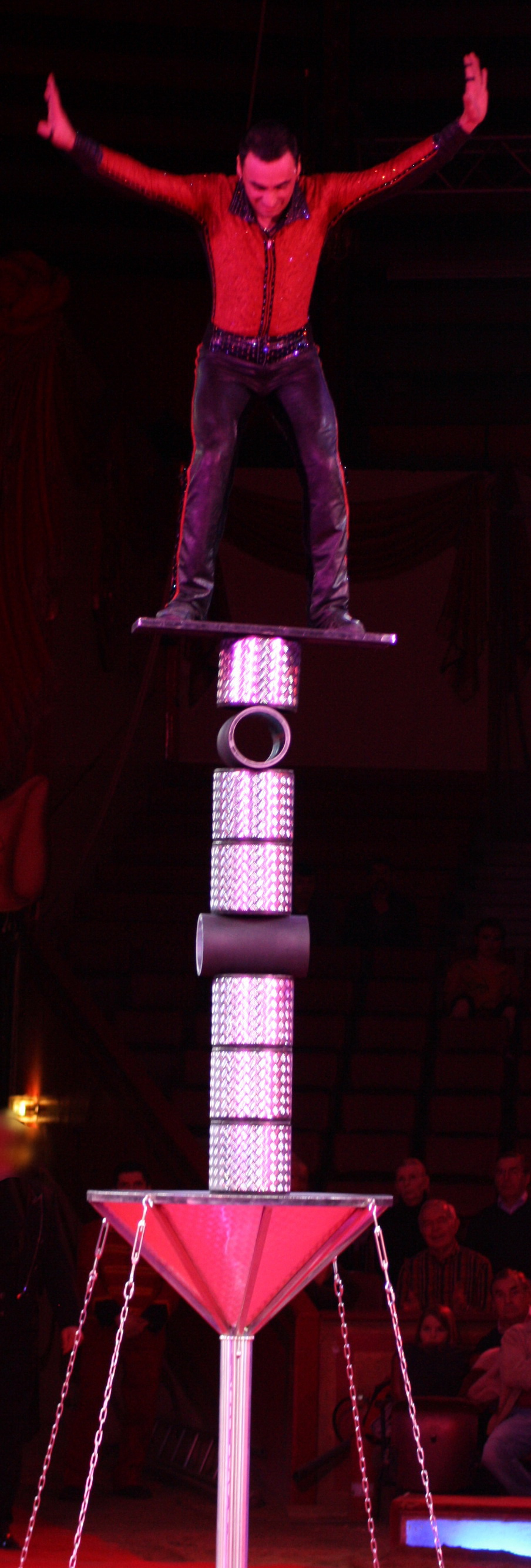 Balance auf Rollen. Dany Daniel aus Portugal.